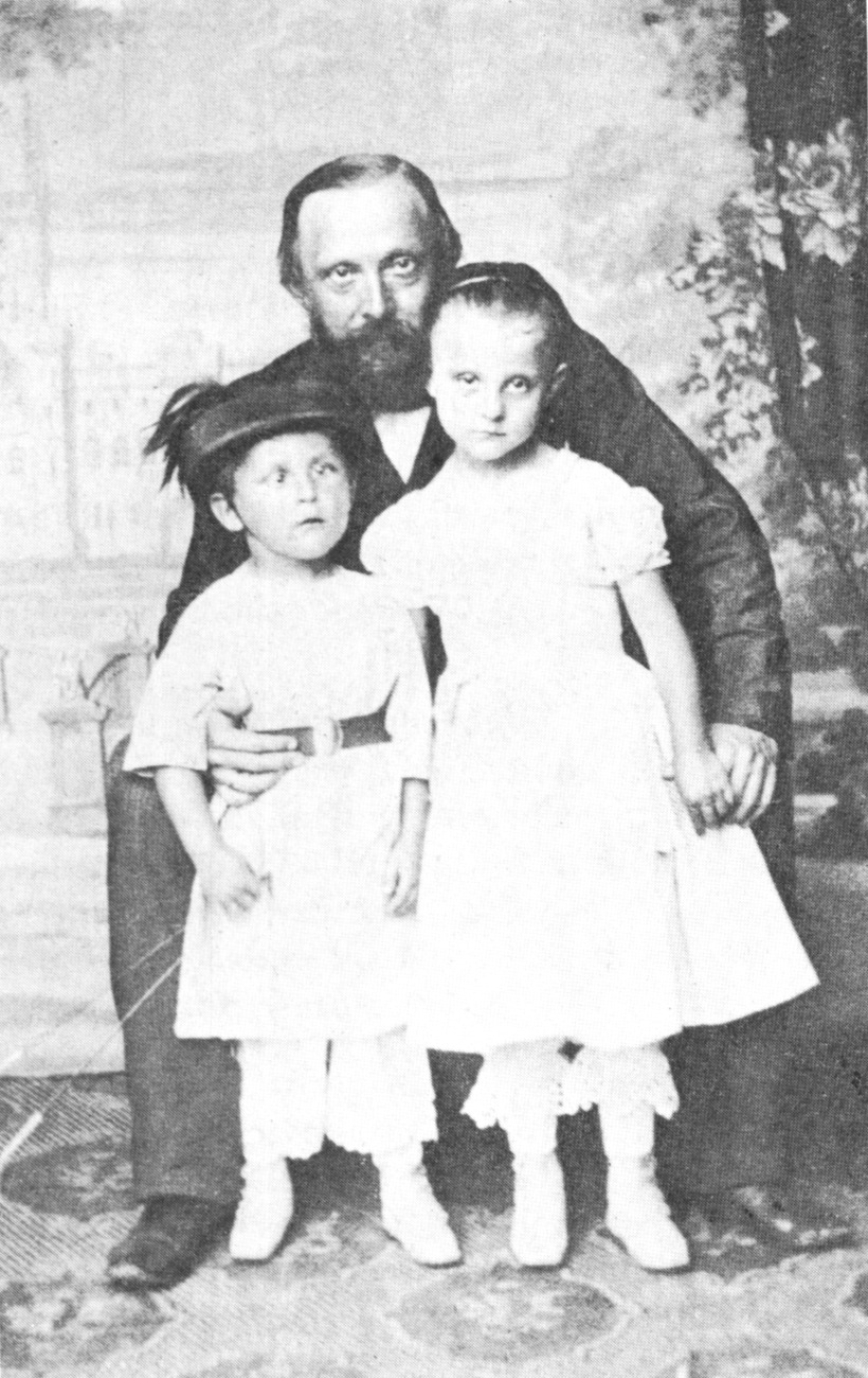 Rudolf Virchow mit seinem Sohn Ernst (geb. 24.1.1858) und seiner Tochter Adele (geb. 1.10.1855), Foto: 8,5 cm × 5,2 cm